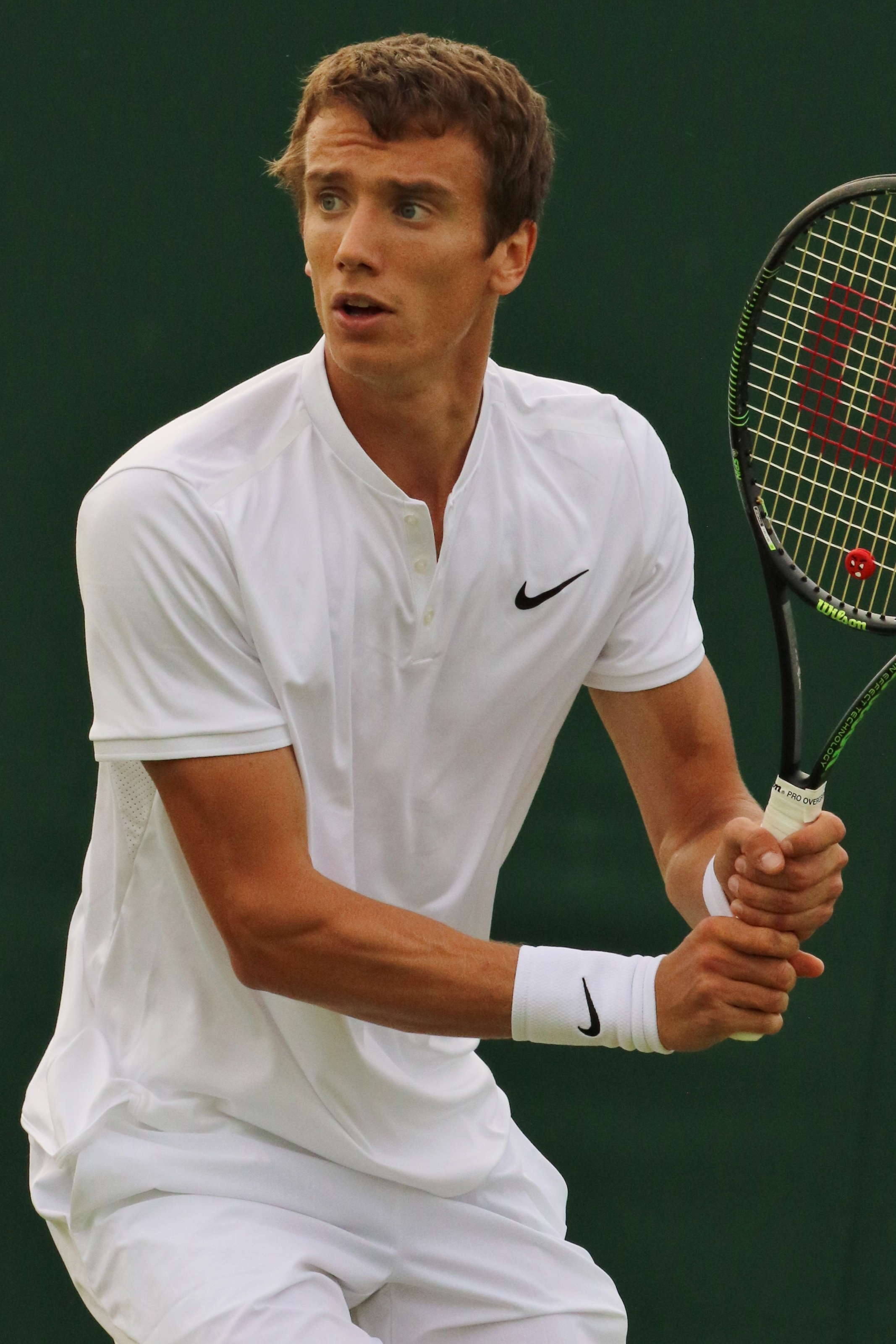 Kuznetsov WM16 (7)